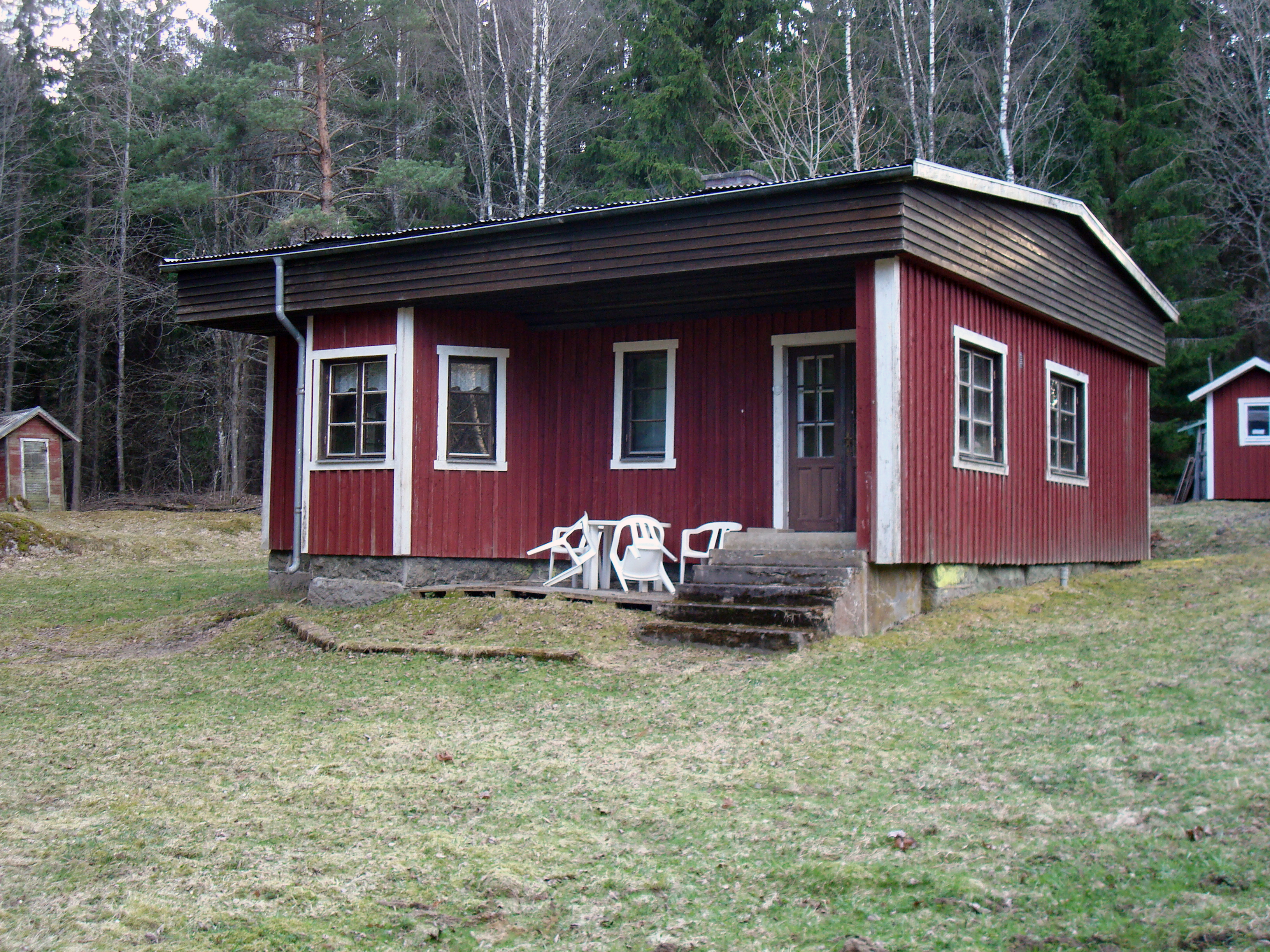 Torpet Bjursbäcken i Hakarp, Sverige